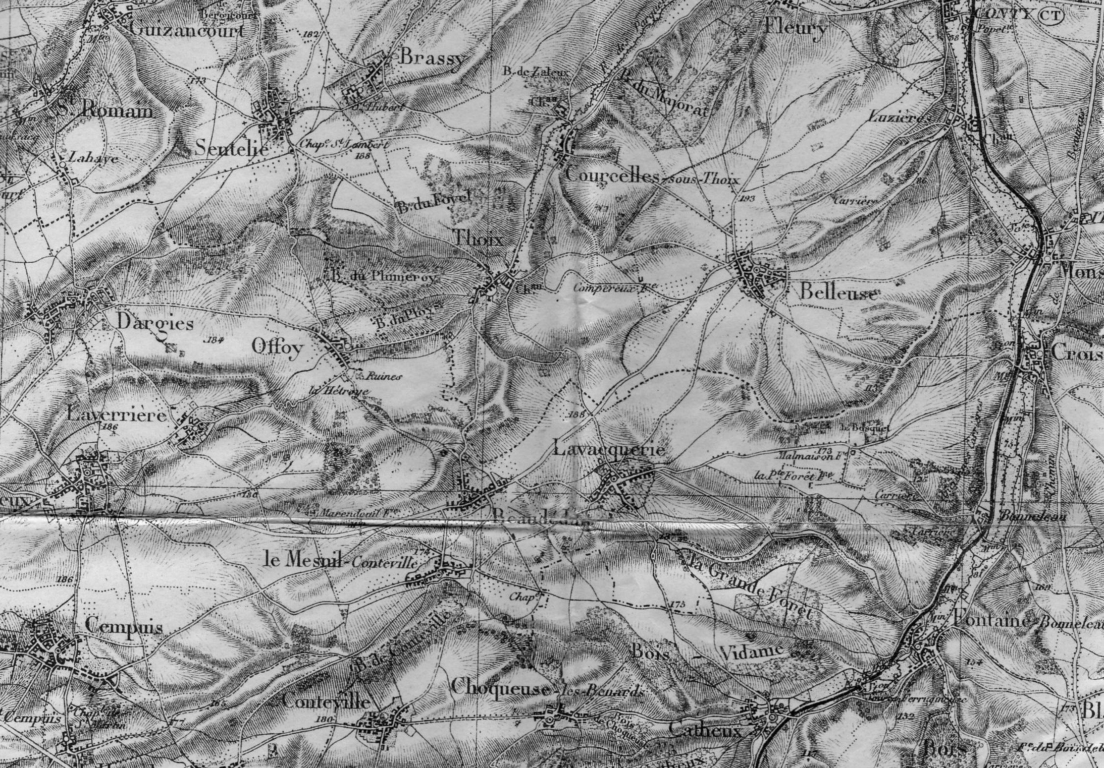 Carte d'état-Major, feuille de Montdidier (Oise), 1/80.000e, révision de 1885, numérisation à 300dpi